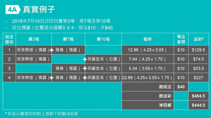 過關真實例子